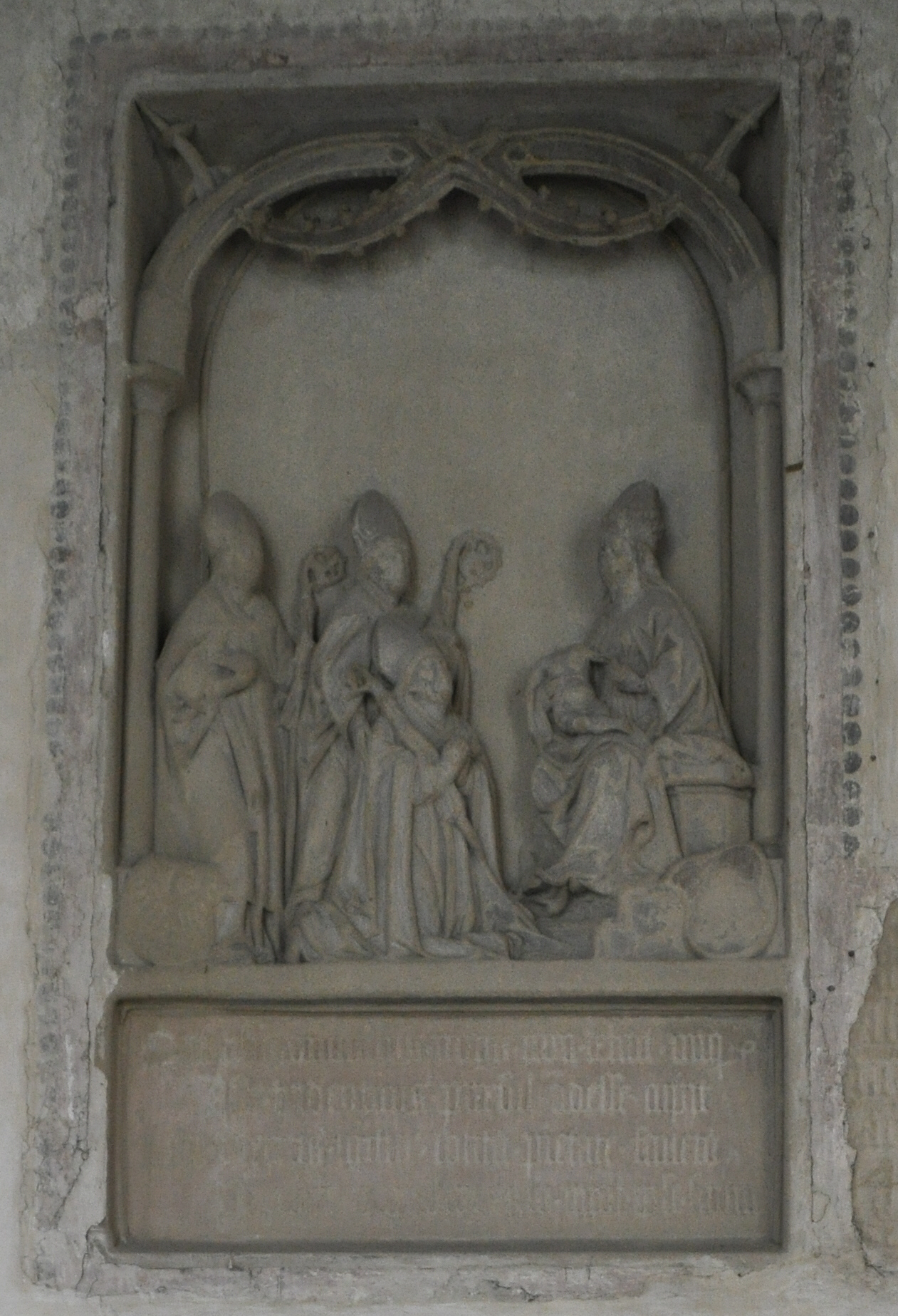 Augsburg, Dom, Kreuzgang, Nordflügel, 6. Joch, Epitaph für Ulrich von Frundsberg († 1493), Bischof von Trient, Kosel Nr. 180; siehe auch Wappen-Schlussstein des 6. Jochs; "Sacra conversazione": Muttergottes mit Jesuskind, Stifter im Bischofsornat, empfohlen von zwei heiligen Bischöfen (hl. Ulrich und wahrscheinlich hl. Vigilius), Wappen des Bistums Trient und Wappen Frundsberg; Meister des Epitaphs Freyberg (Nr. 66) = Hanns Peurlin d. M. zugeschrieben; 1487 datiert. Attributed to Hanns Peurlin der Mittlere (1460–1508) Alternative names Hanns Peurlin (II)DescriptionGerman sculptorDate of birth/death circa 1460 1508 Work period1483–1507/1508Work location AusgburgAuthority control : Q30304666 VIAF: 96577636 ULAN: 500121513 GND: 102500703 creator QS:P170,Q4233718,P1773,Q30304666